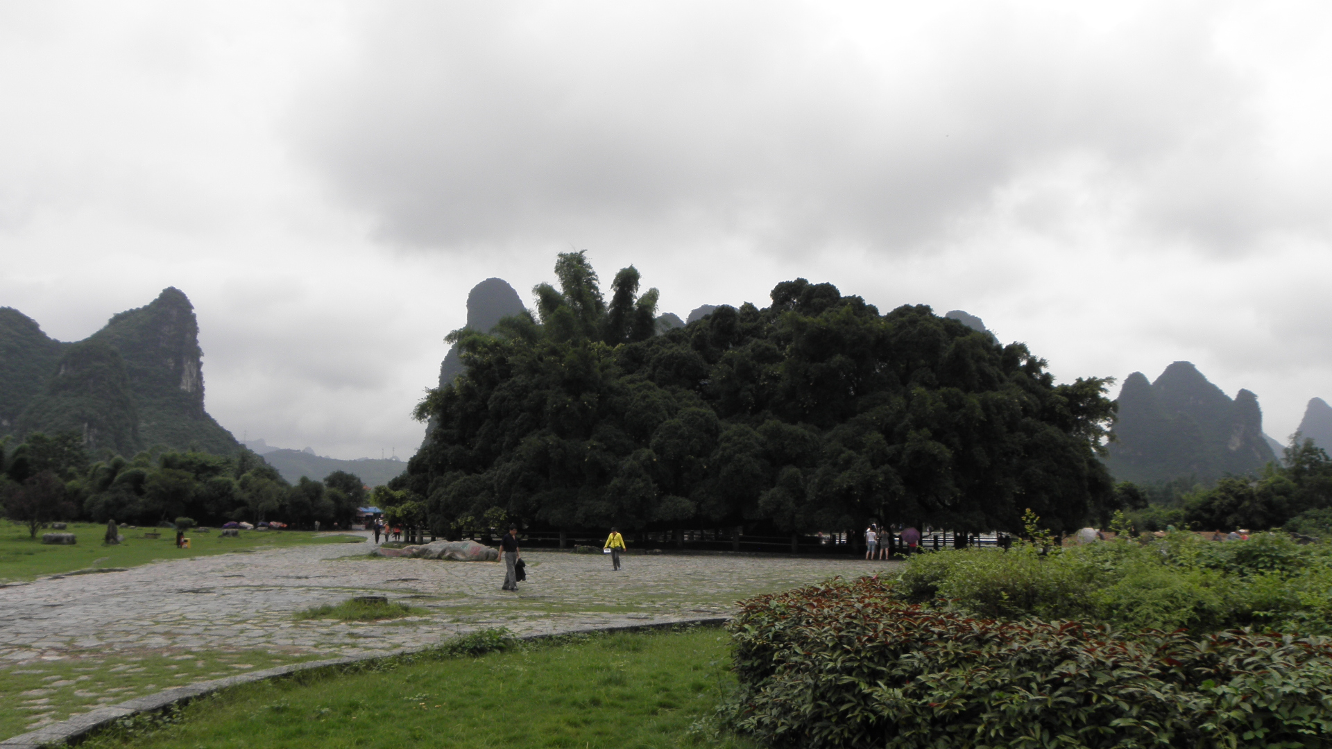 大榕树景区--大榕树